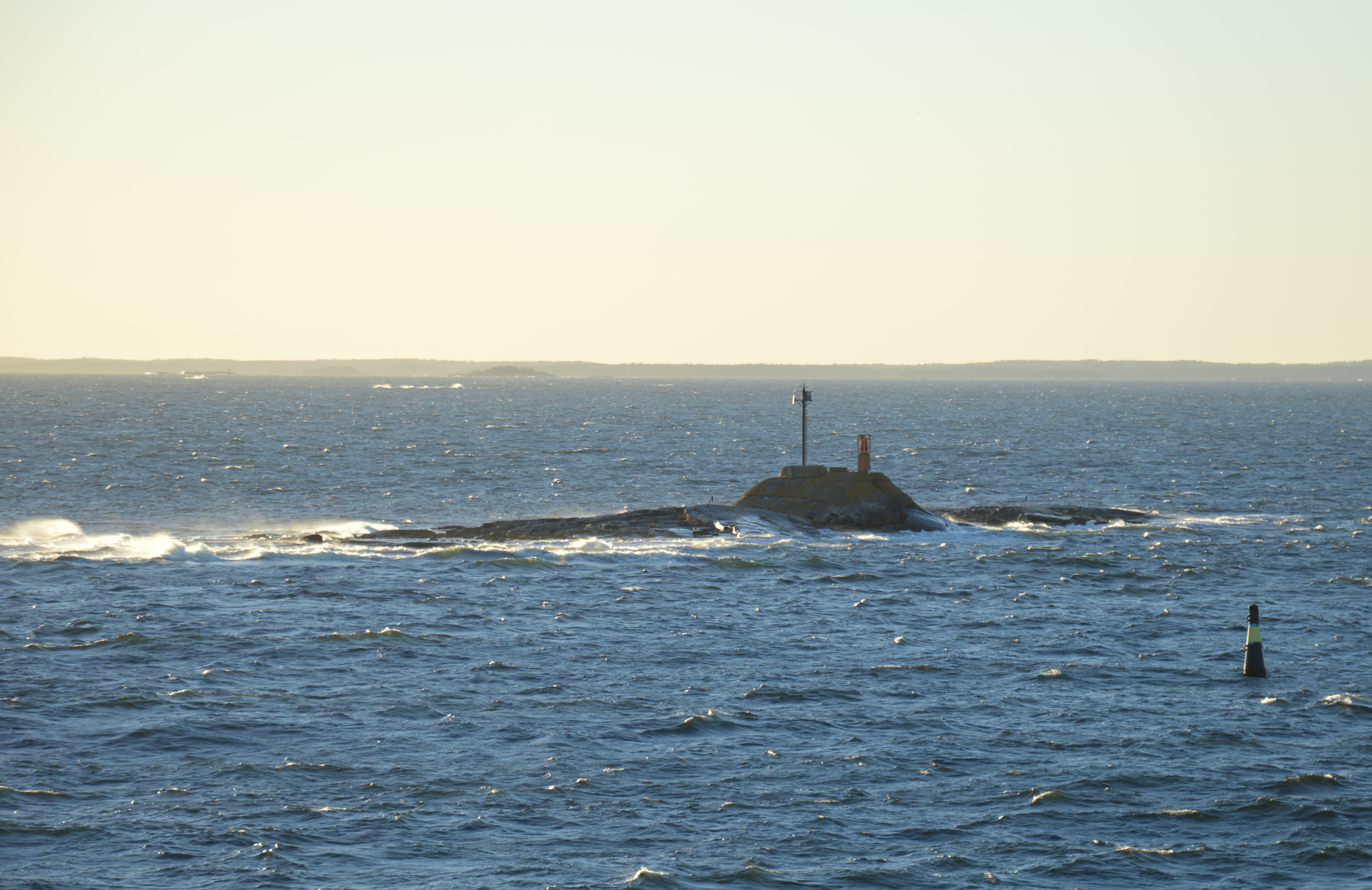 Schäre Halliluoto vor Helsinki